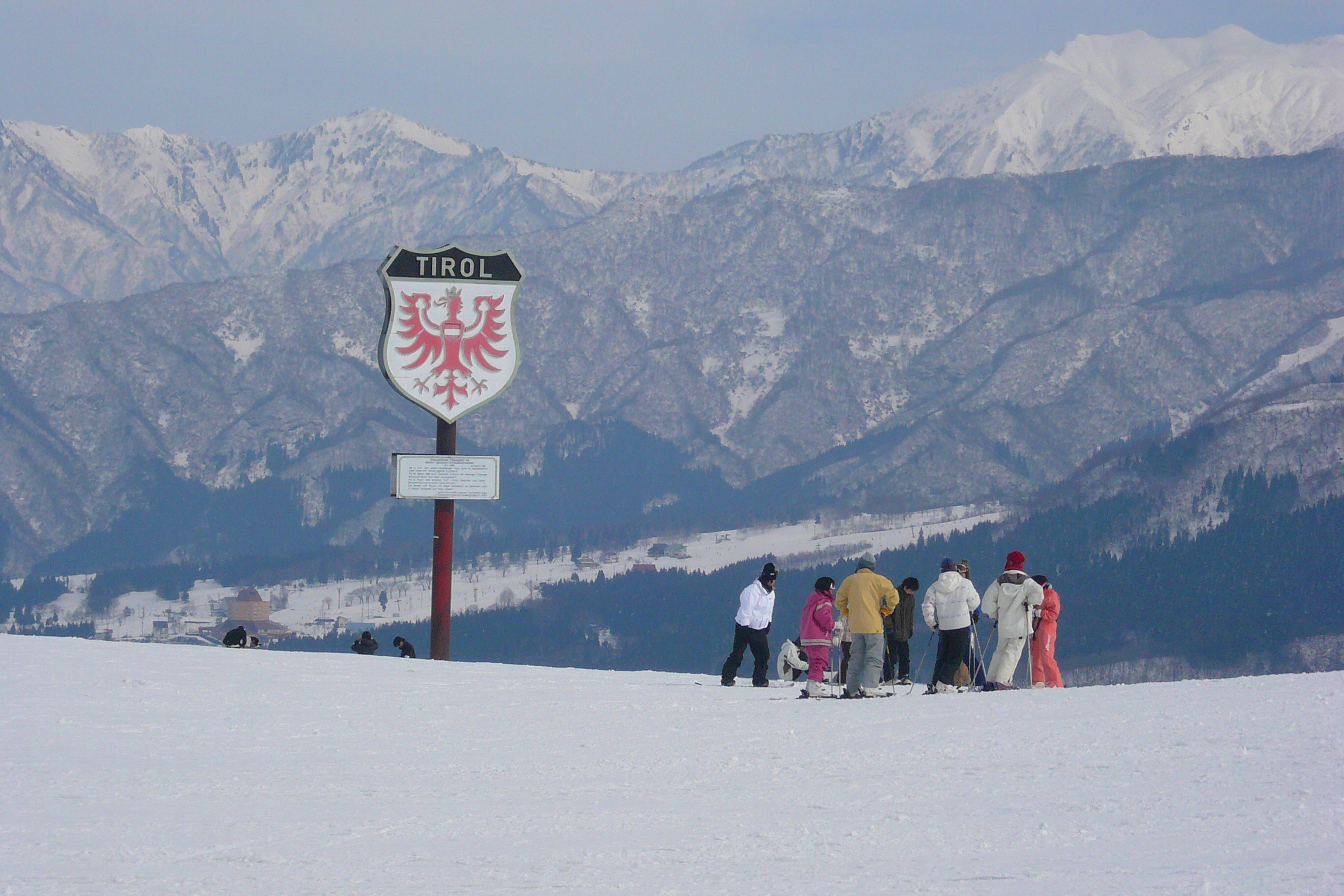 Skiing @Gala NOT Tirol